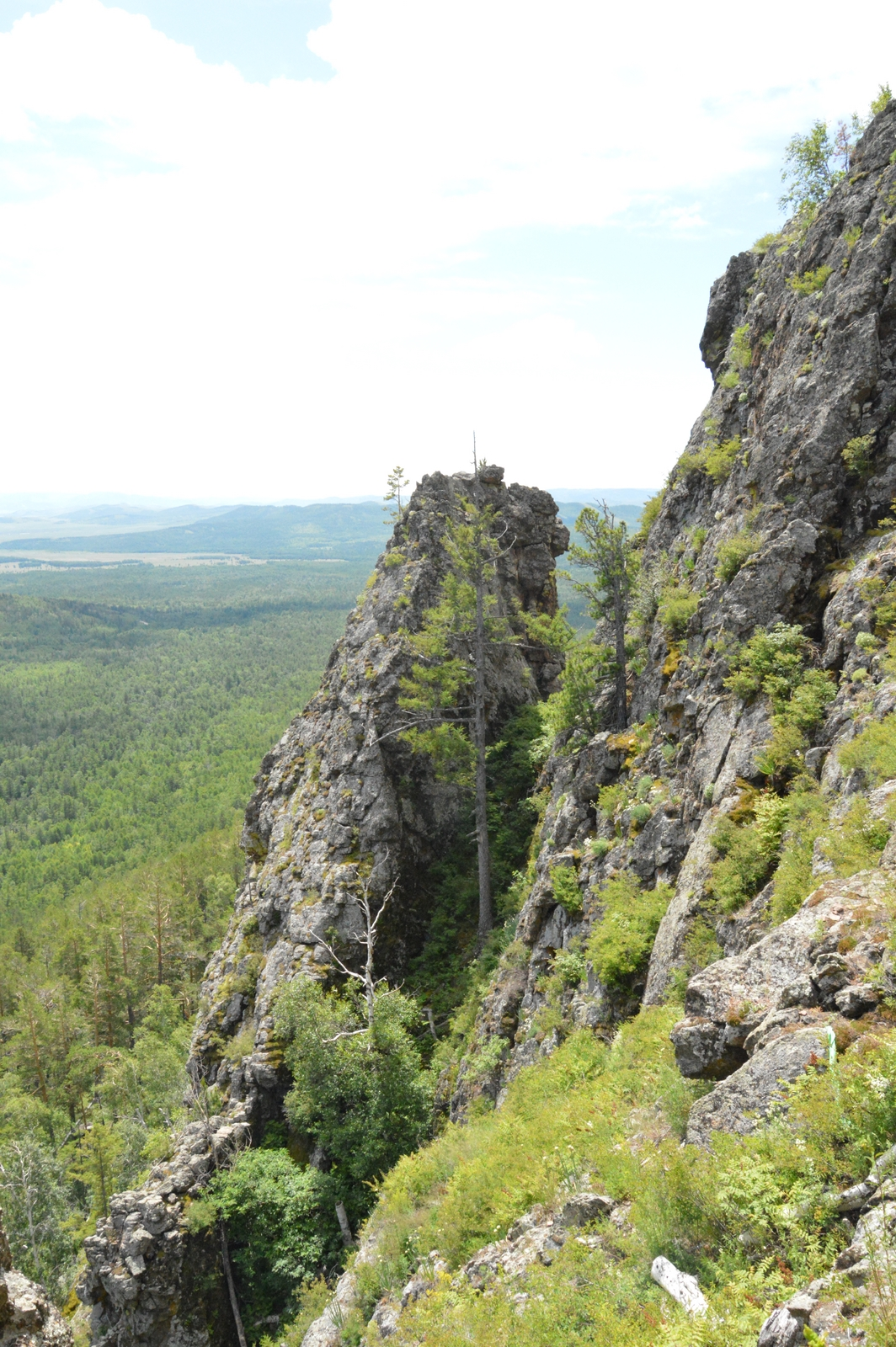 Голец Алханай, Дульдургинский район This image is related to the protected area of Russia number 7510032